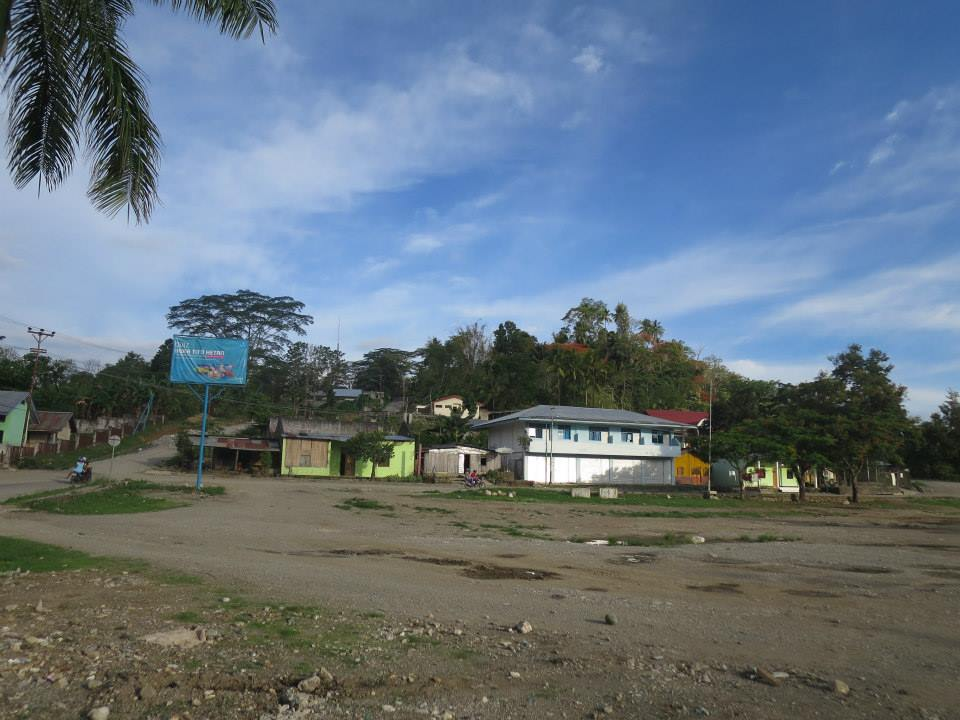 Same, Manufahi